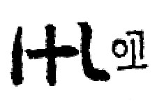 原刊本捷解新語の「御」/ŋko/。『捷解新語 本文・国語索引・解題』京都大学国語国文学会、1957年。のコピーをスキャンし、更に罫線消す等の加工。